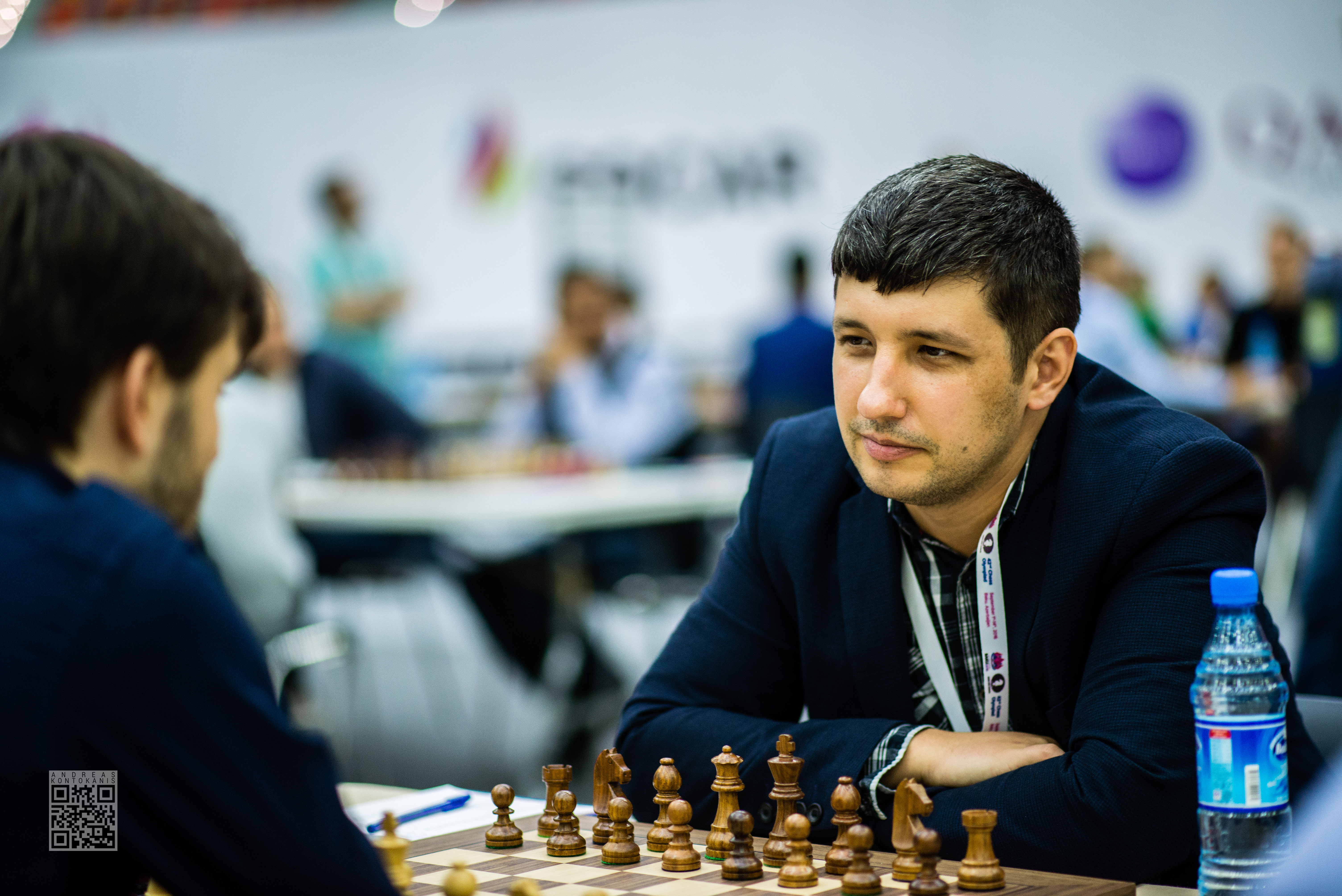 Lupulescu Constantin